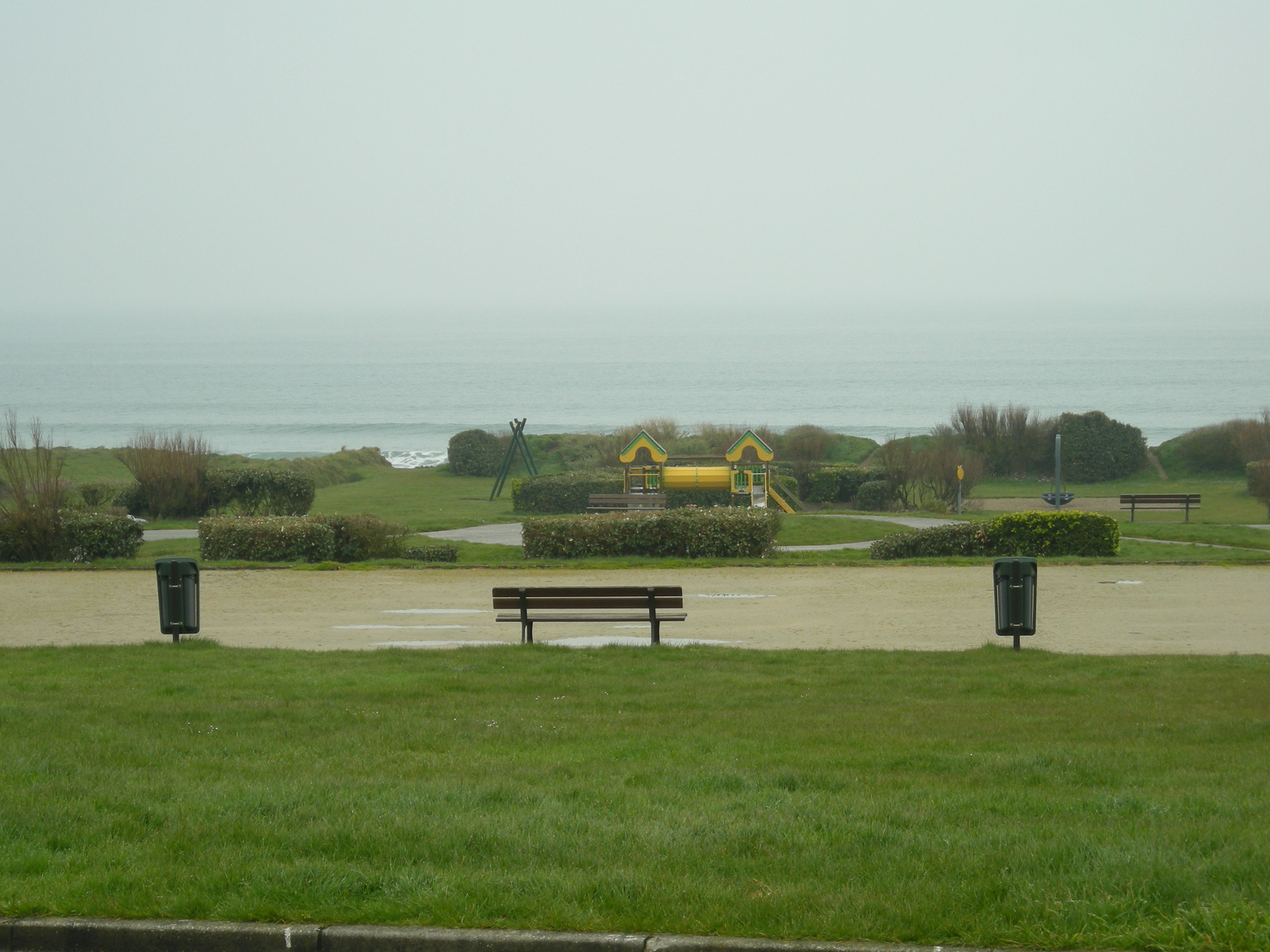 Espaces verts en bord de mer à l'Anse du Sciotot sur la commune des Pieux (département de la Manche)